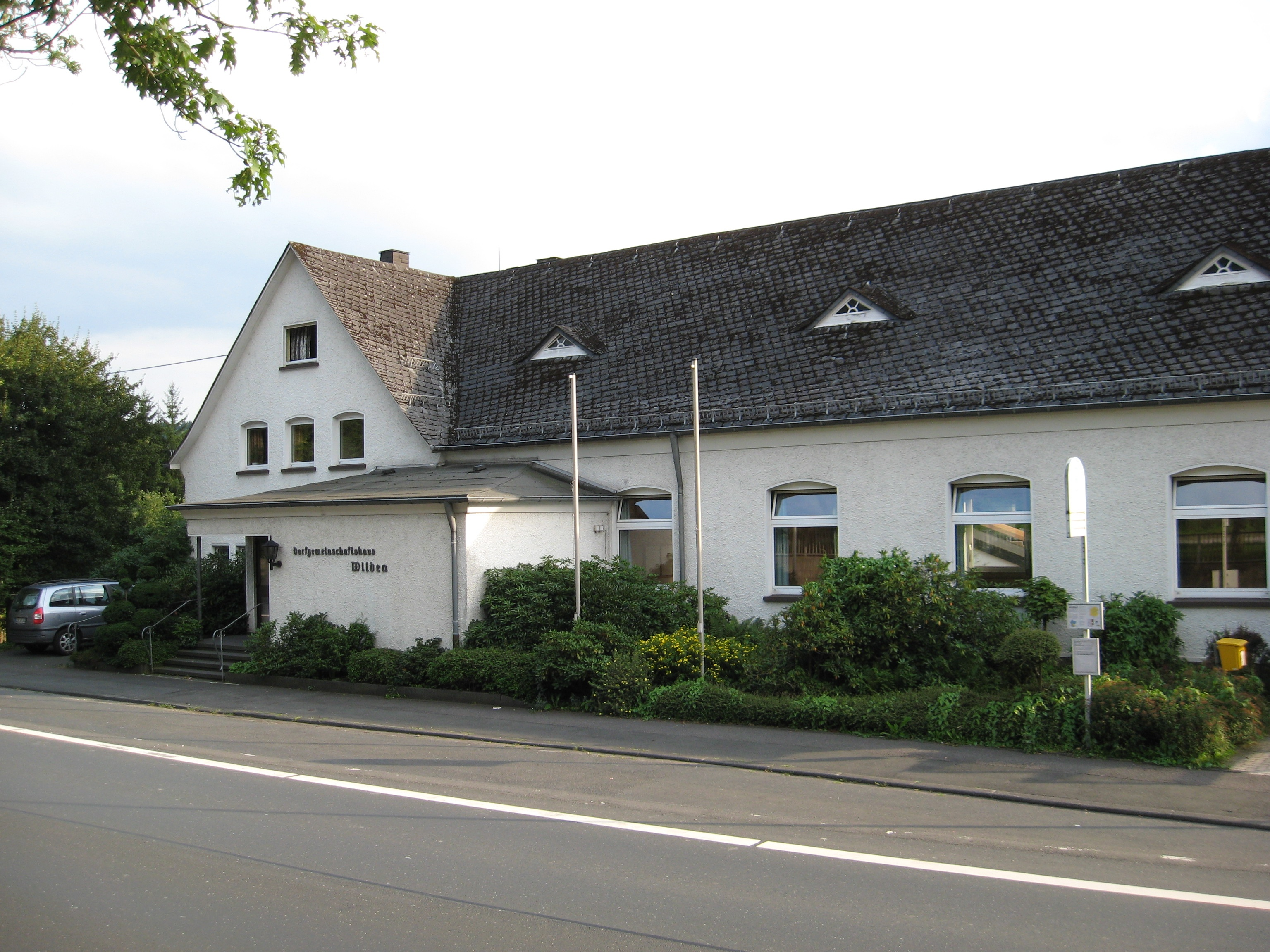 Das Wildener Dorfgemeinschaftshaus.